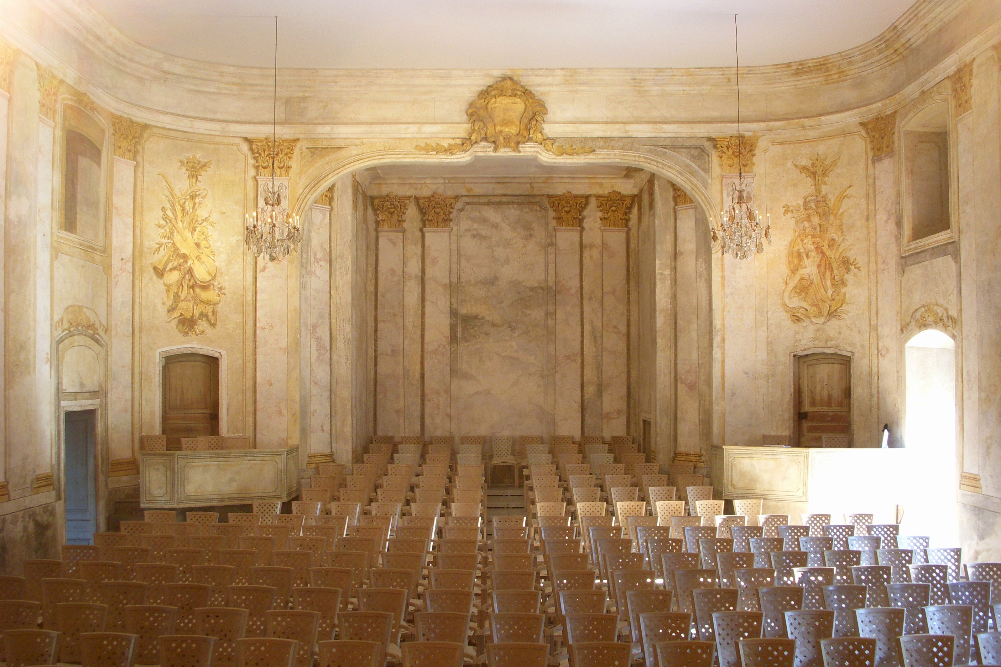 Ulriksdals slottsteater, salong